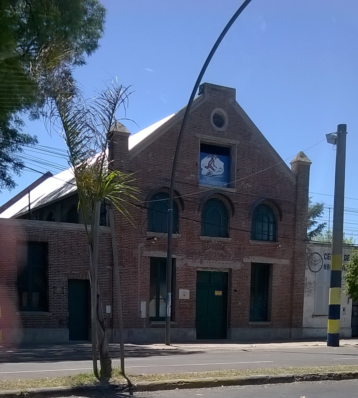 Sede fundacional del Club Atlético Rosario Central, sita en Avenida Alberdi 23 bis, donde la intitutución fue creada el 24 de diciembre de 1889.